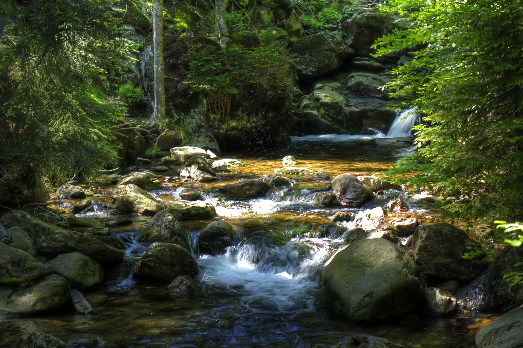 Riesbach zwischen Rieslochfälle und Bodenmais